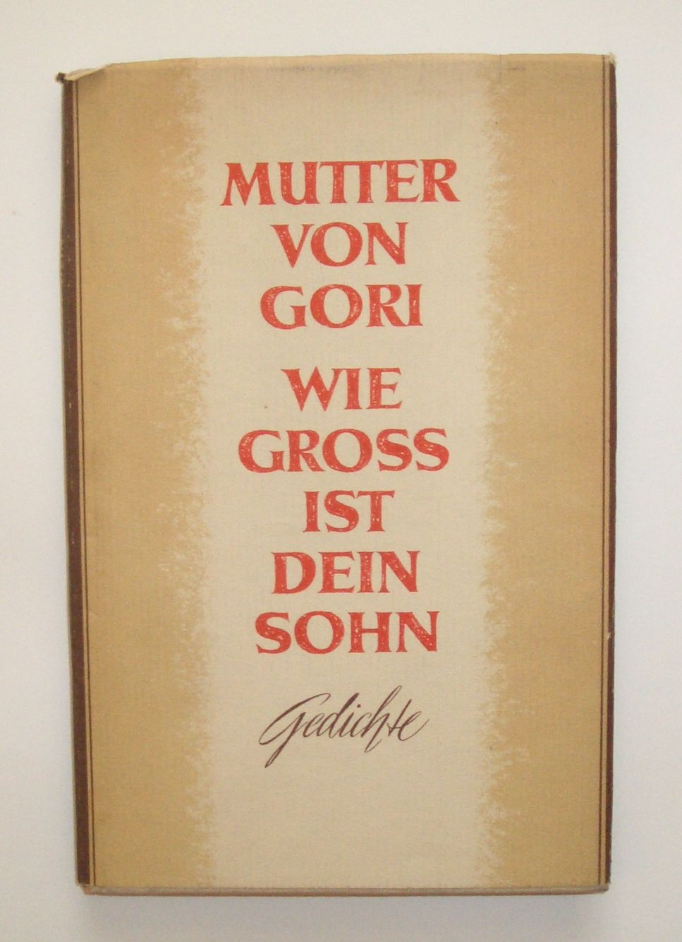 Herbert Otto (Hrsg.): Mutter von Gori - wie groß ist dein Sohn. Deutsche Dichter singen von Stalin. Berlin, Kultur und Fortschritt, 1952. (Sammlung von Jubelgedichten auf Stalin von Johannes R. Becher, Erich Weinert, Hedda Zinner, Max Zimmering, Hans Lorbeer, Helmut Kroll, Walter Stranka, Willi Layh, Kuba, Stephan Hermlin, Paul Wiens, Bernhard Seeger, Franz Fühmann, Wolfgang Neuhaus und Herbert Arens. J. W. Stalin zum 73. Geburtstag gewidmet)